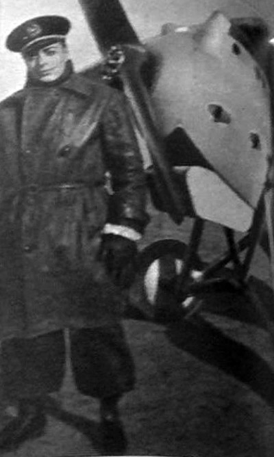 Srpskohrvatski / српскохрватски: Pilot Boško Petrović pred avionom, Madrid 1937. godine.